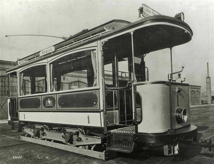 Foto van motorwagen 1 van de Gemeentetram Utrecht op het terrein van MAN. Vervaardiger onbekend. Gelet op artikel 38 van de Auteurswet 1912 en de nadere invulling daarvan zoals verduidelijkt onder punt 1.1.5.12 van de Juridische wegwijzer archieven en musea online en de discussie hier is het auteursrecht op deze afbeelding vervallen vanaf 1 januari 1976.